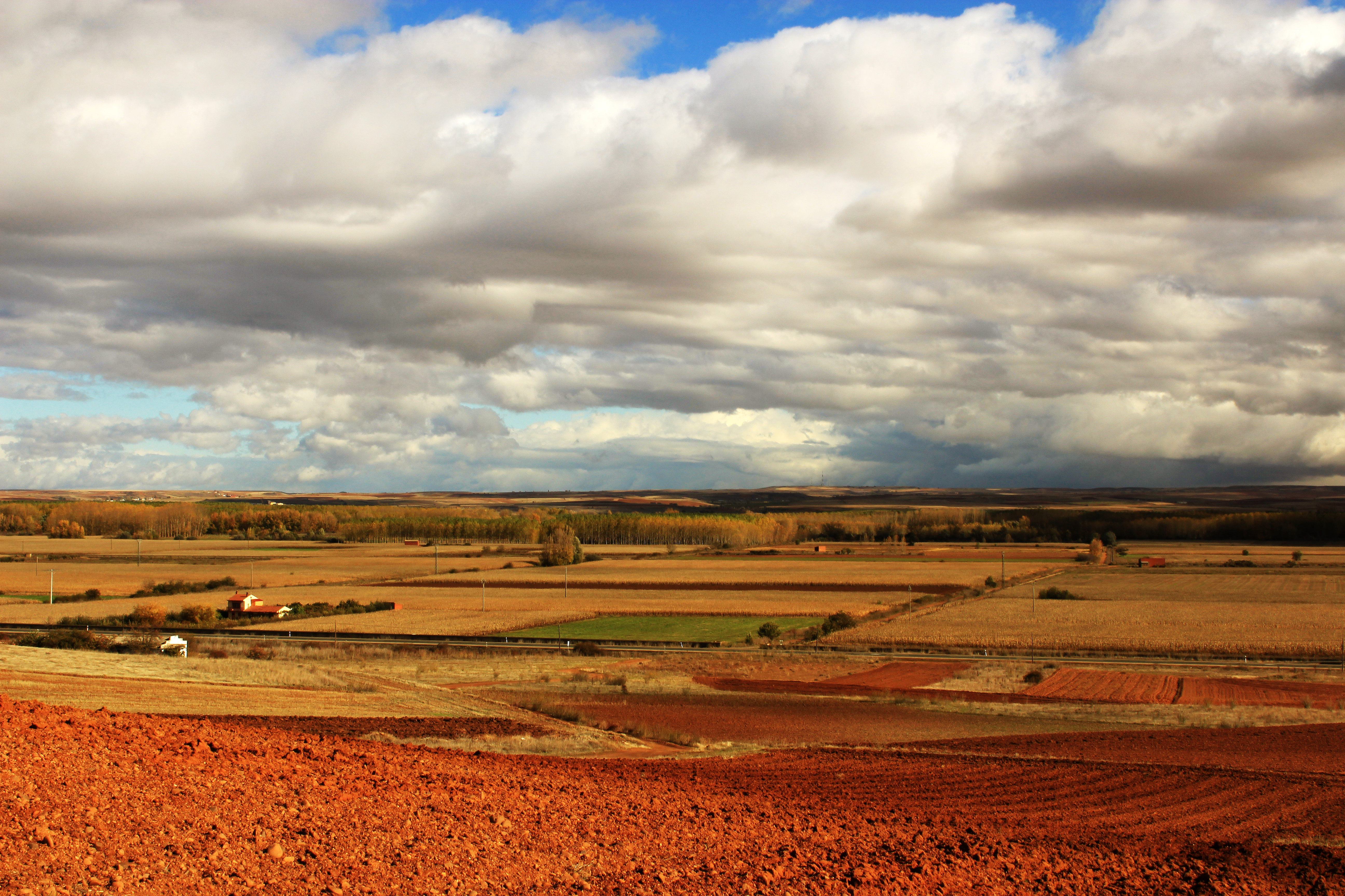 Vega del Esla desde el Cuesto, en Villamañán.